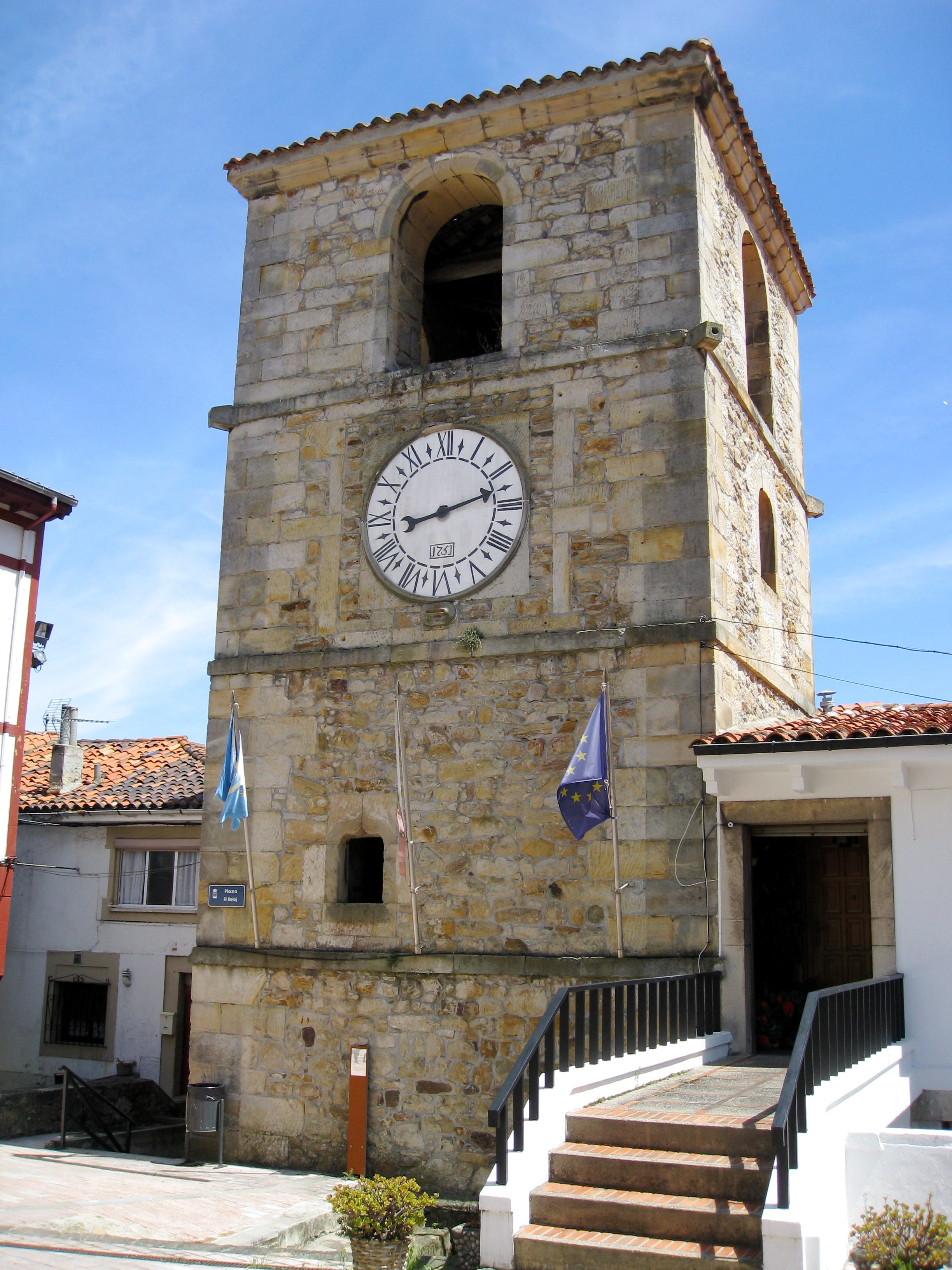 Torre del reloj en Lastres, Colunga, Asturias